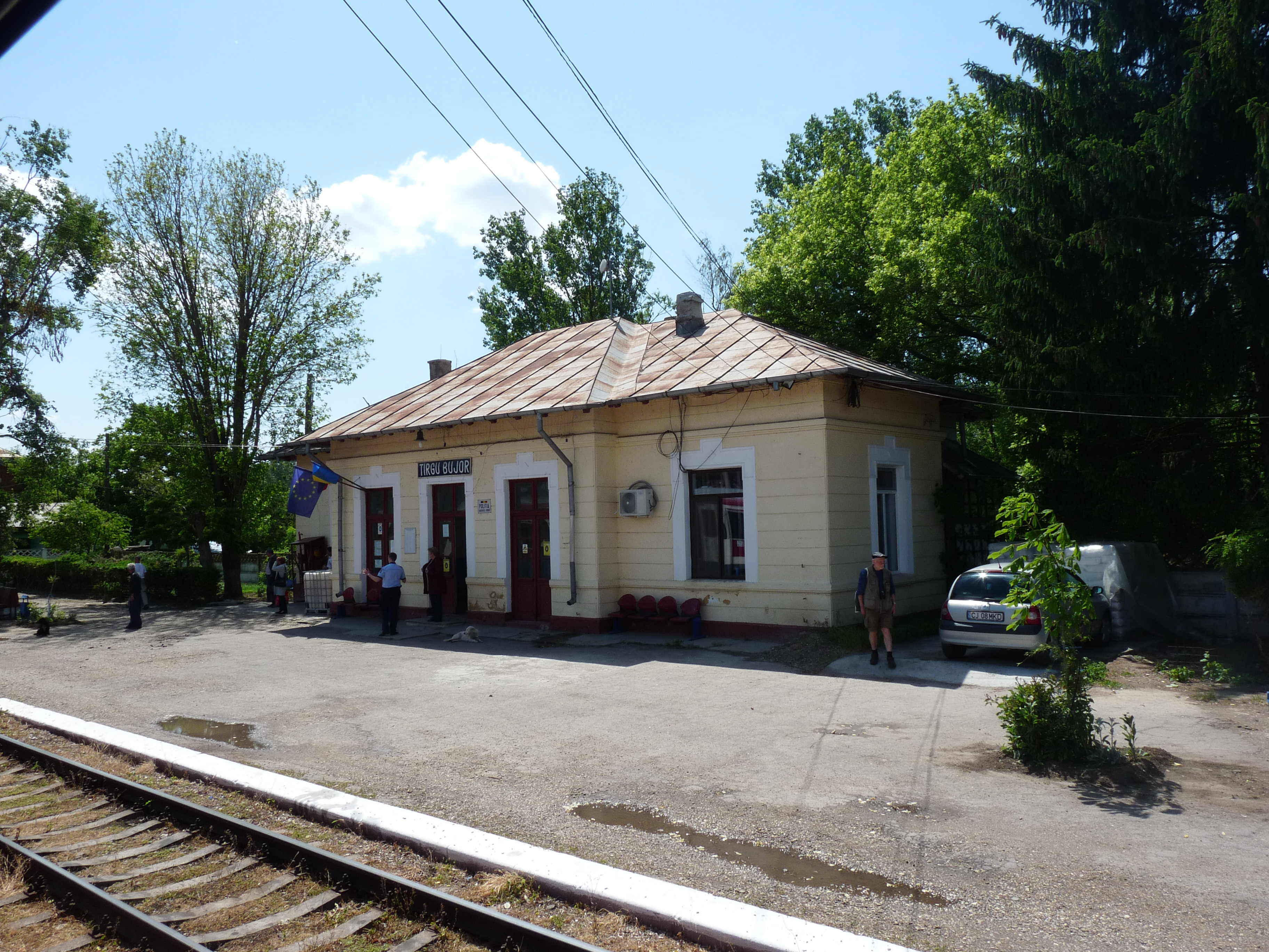 Târgu Bujor stationsgebouw